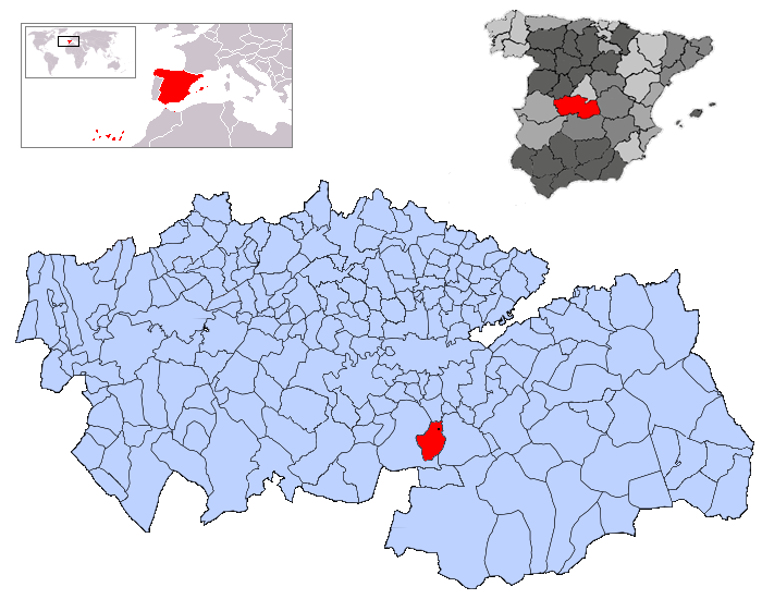 Sonseca en la provincia de Toledo